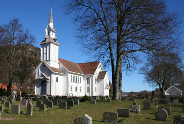 Søgne hovedkirke